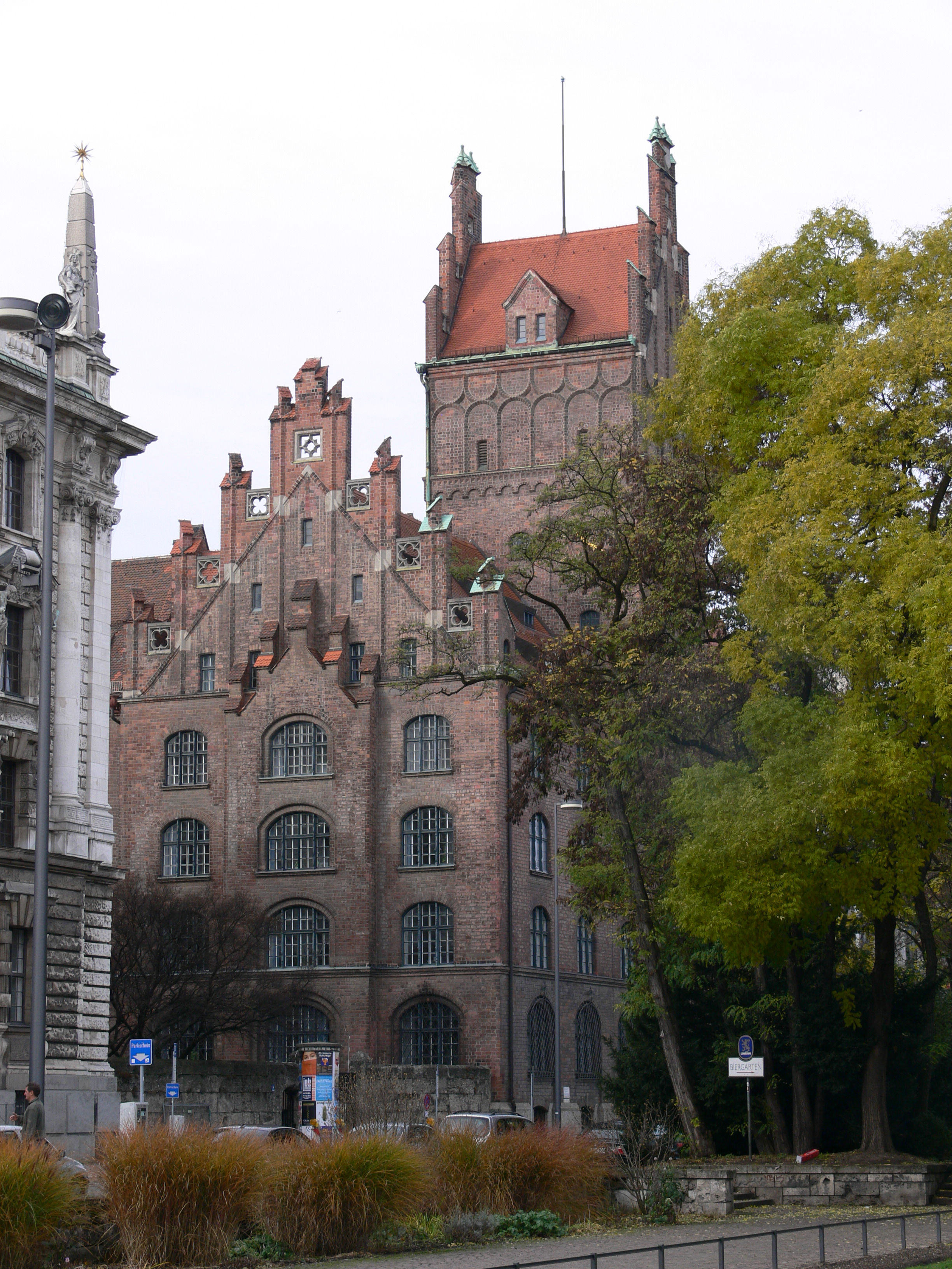 München, "Neues Jusitzgebäude" neben dem Jusitzpalast